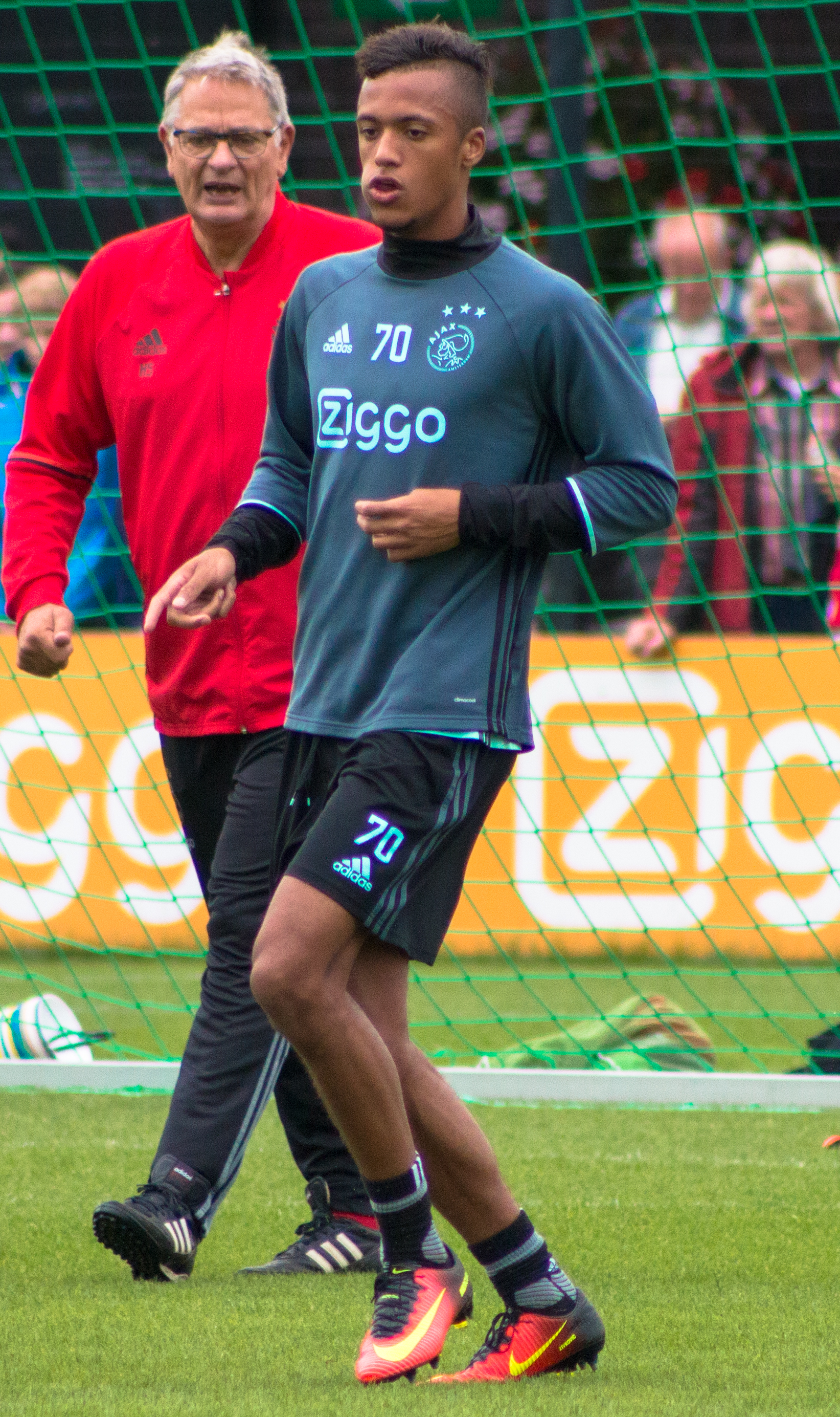 Ajax Open Training